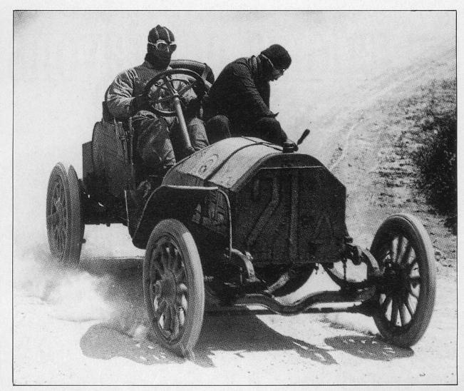 Alessandro Cagno (1883-1971), alla Targa Florio 1907